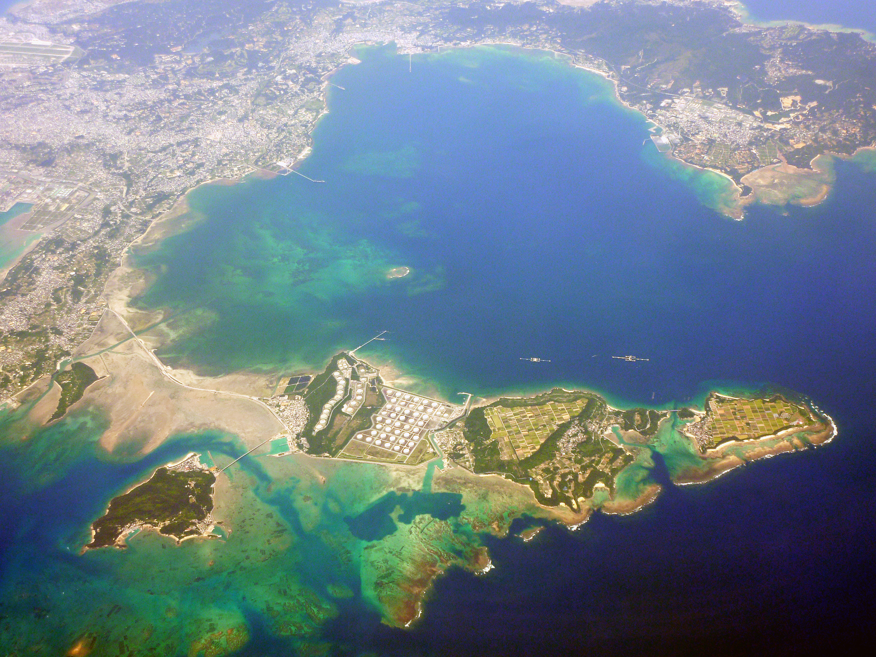 金武湾空撮画像。海中道路、石油タンク群を望む。